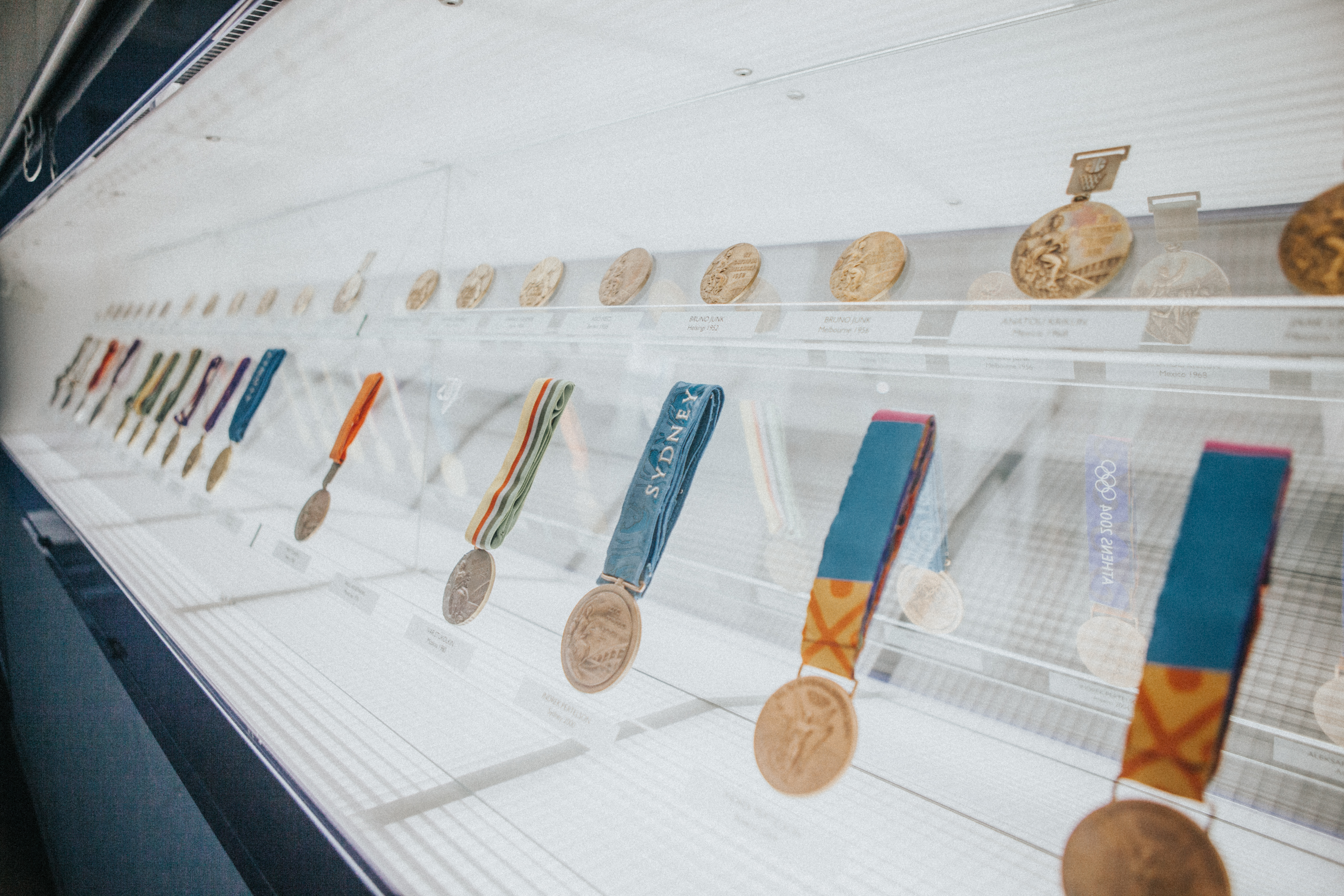 Olümpiamängude medalid